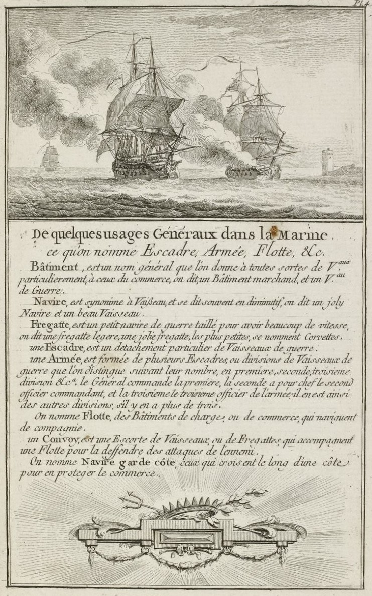 Définition de plusieurs termes de marine. Extrait de Marine militaire, ou Recueil des différents vaisseaux qui servent à la guerre, suivis des manœuvres qui ont le plus de rapport au combat ainsi qu'à l'attaque et la défense des ports, par Ozanne l'aîné.